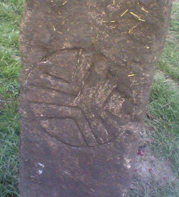 این حوض قدیمی در هنگام کندن قبر در مزارستان روستای فرخ زاد پیدا شده و هم اکنون در موزه نقده نگهداری می شود.